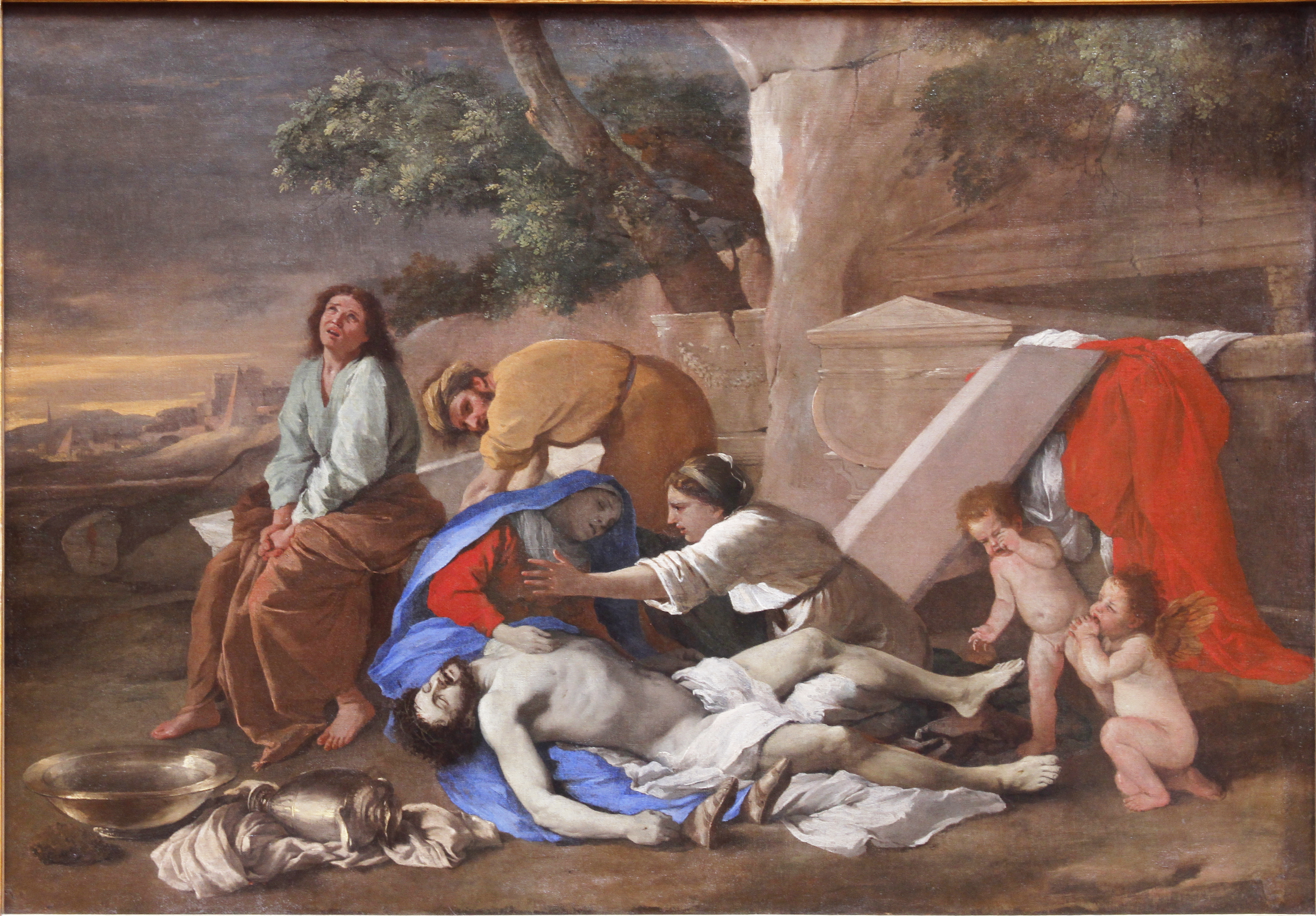 Alte Pinakothek - Munich - Germany